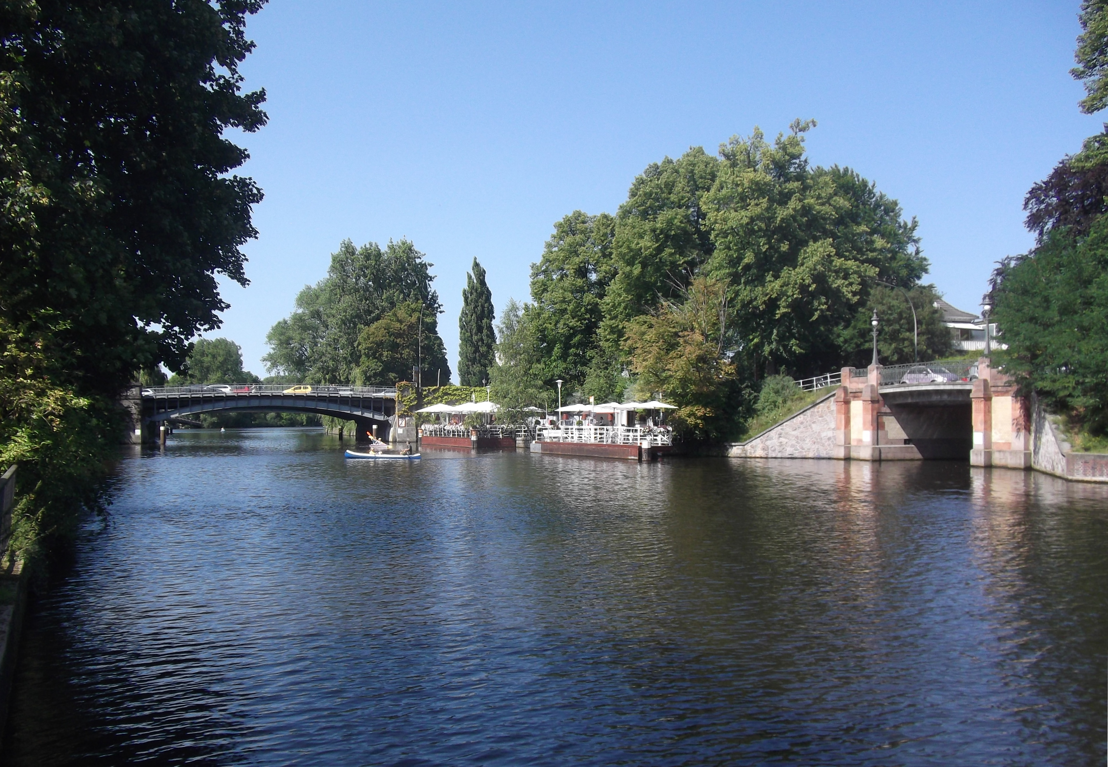 Hamburg, August 2015